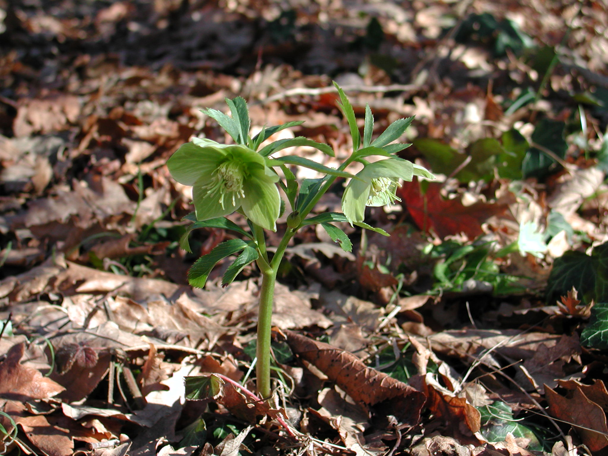 picture taken at Appennino reggiano, Carpineti, Italy Helleborus - Elleboro Paolo da Reggio